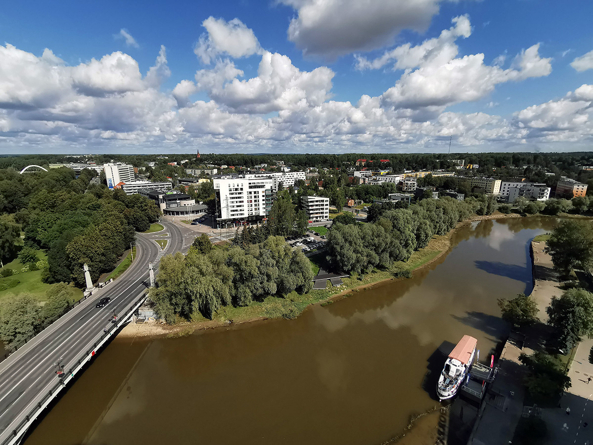 Ülejõe linnaosa nähtuna Emajõe Ärikeskusest aastal 2019